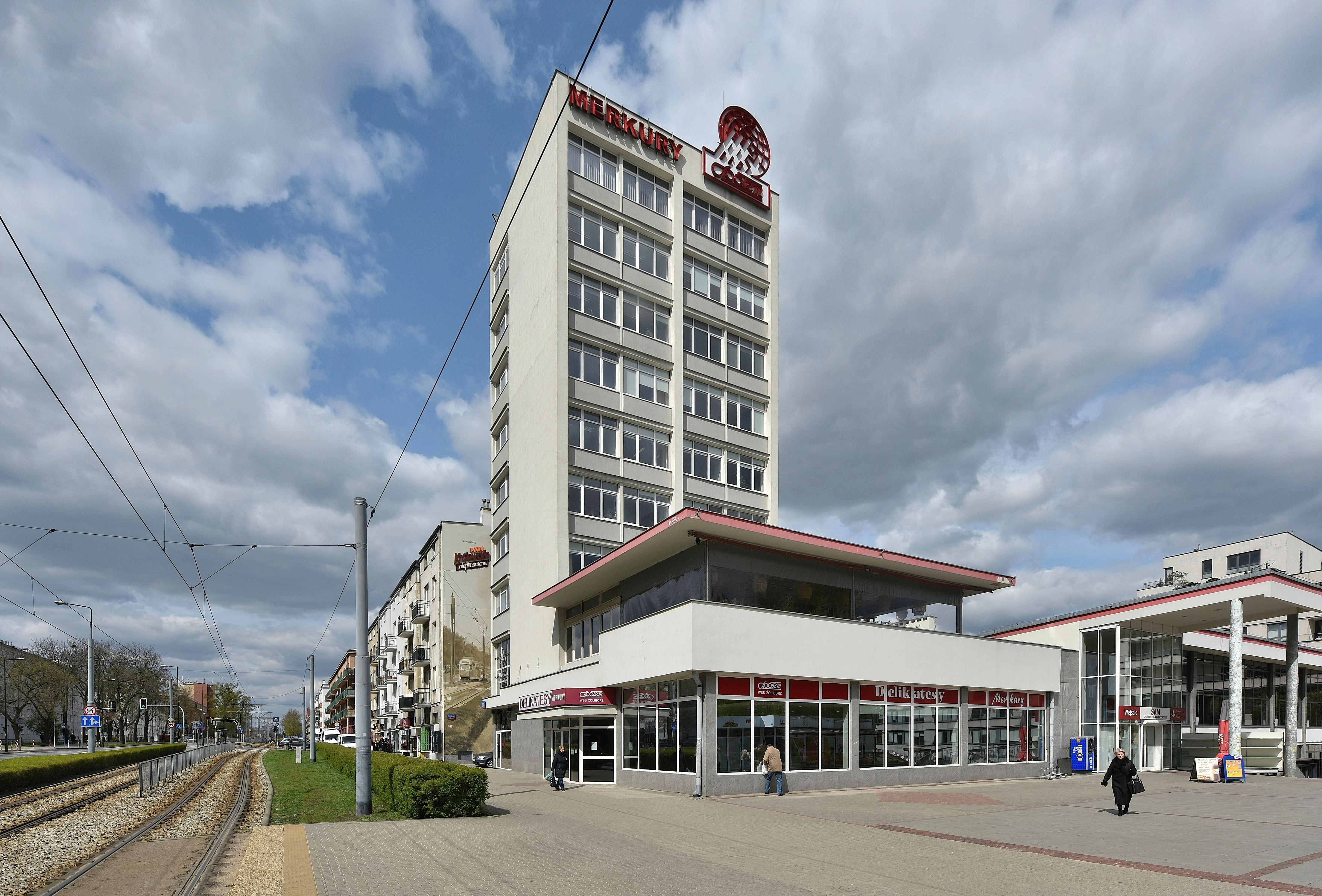 Dom Handlowy Merkury przy ul. Słowackiego 16/18 w Warszawie